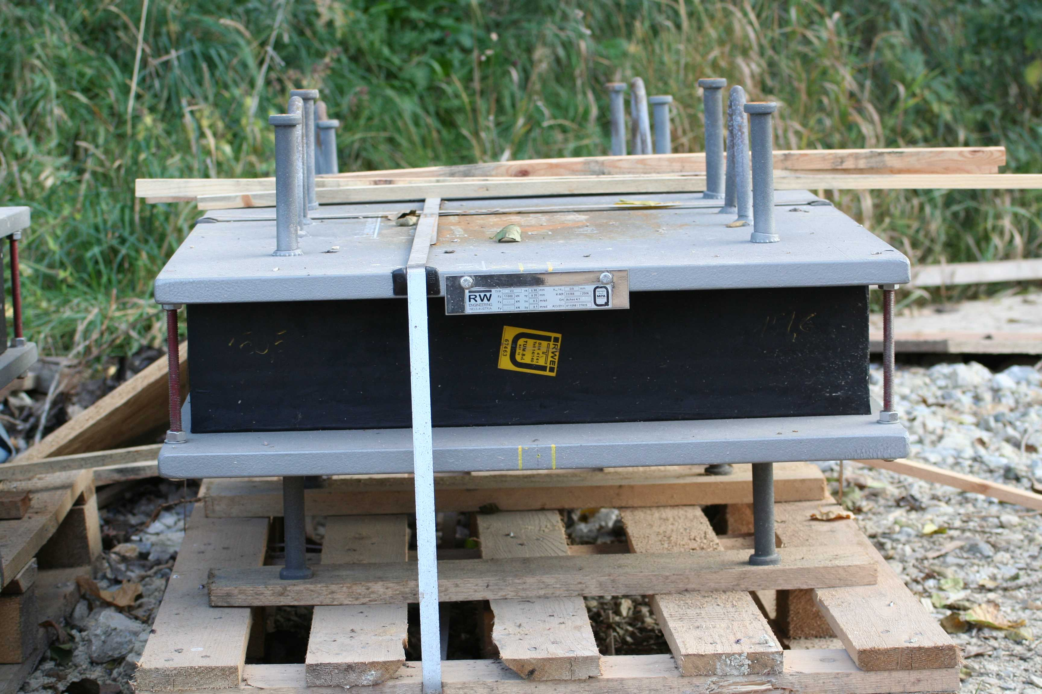 Elastomerlager, Füllbachbrücke Ebersdorf